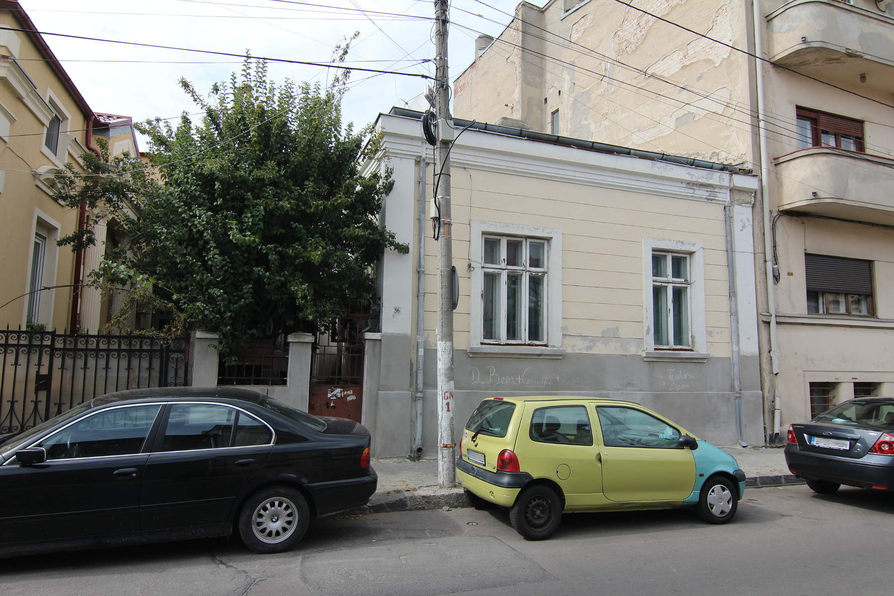 Casele M. I. Demetrescu